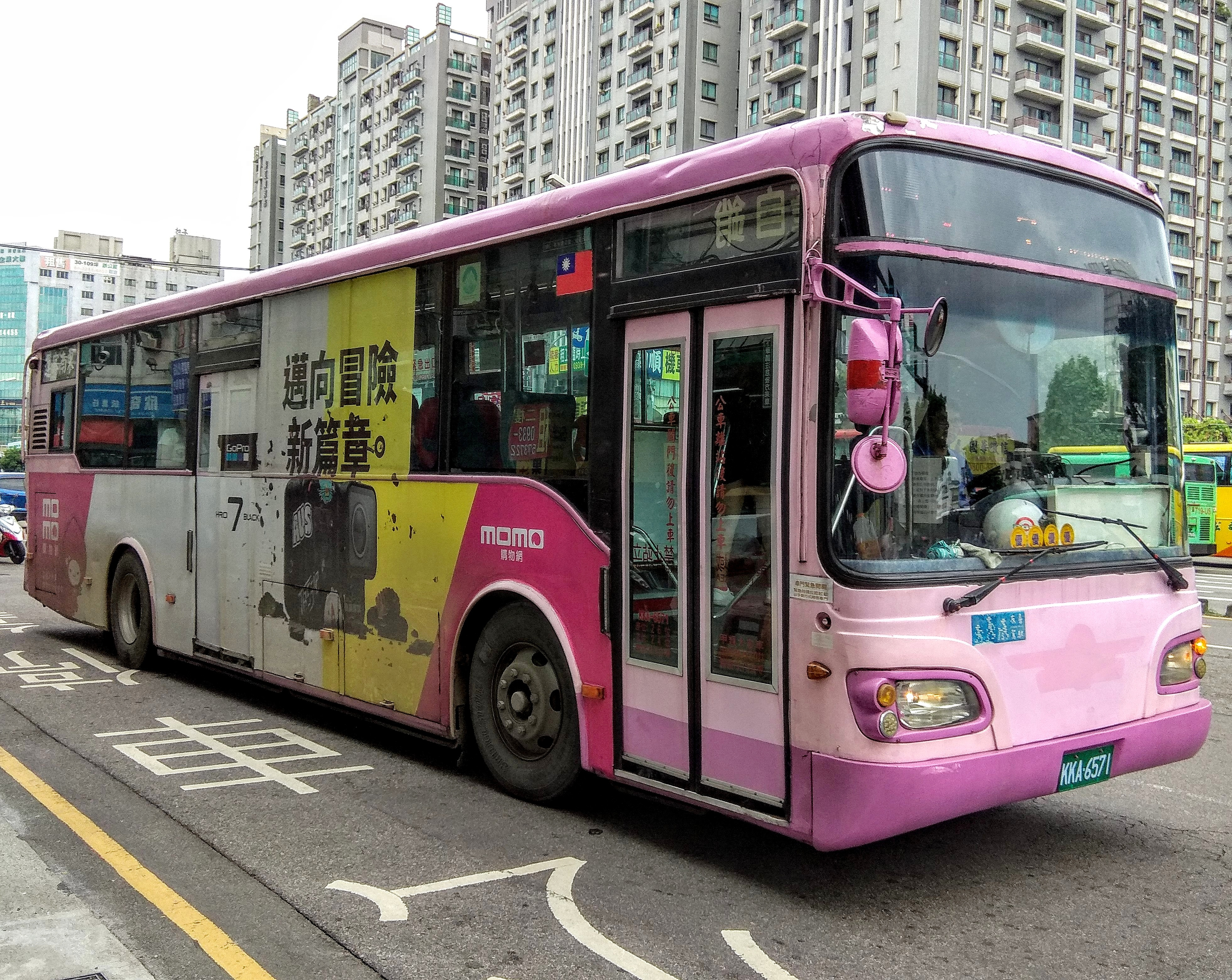 中文（台灣）: 東南客運日野RK8JRSA大客車KKA-6571 原欣欣客運車輛